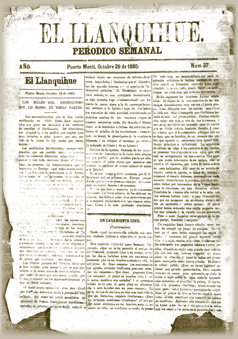 Portada del diario El Llanquihue de Puerto Montt del 29 de octubre de 1885